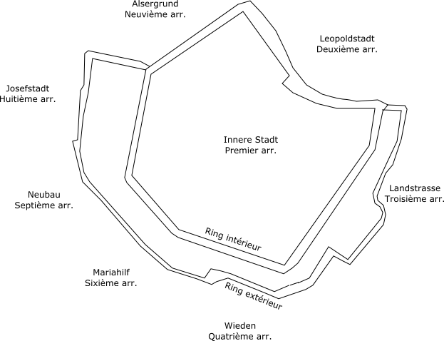 Titre: Schéma du Ring à Vienne (Autriche) Date: Avril 2006 Auteur: réalisé par Witoki sous la licence suivante